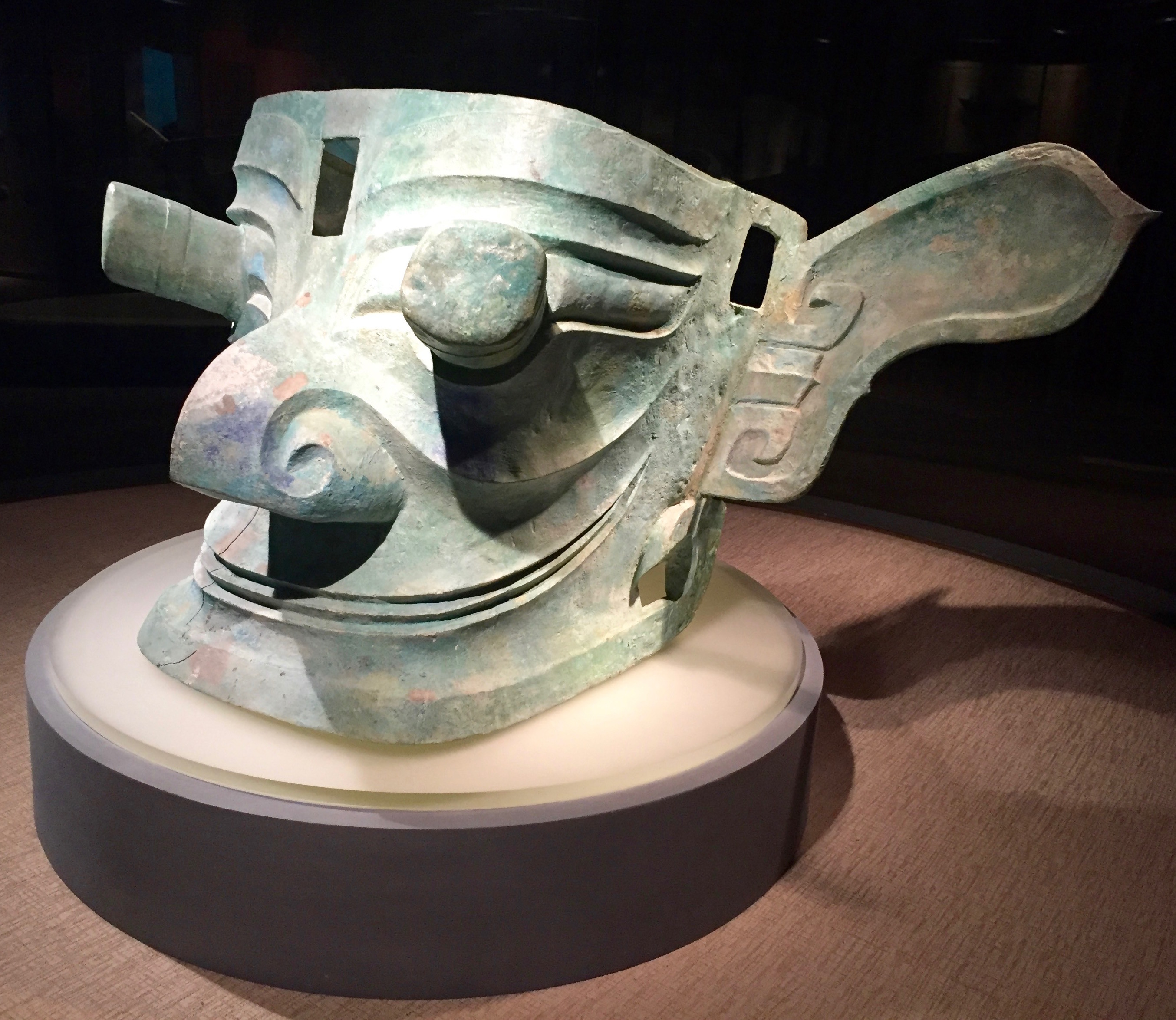 The 138 cm wide and 66 cm high mask with protruding pupils is the second largest mask food at Sanxinfdui